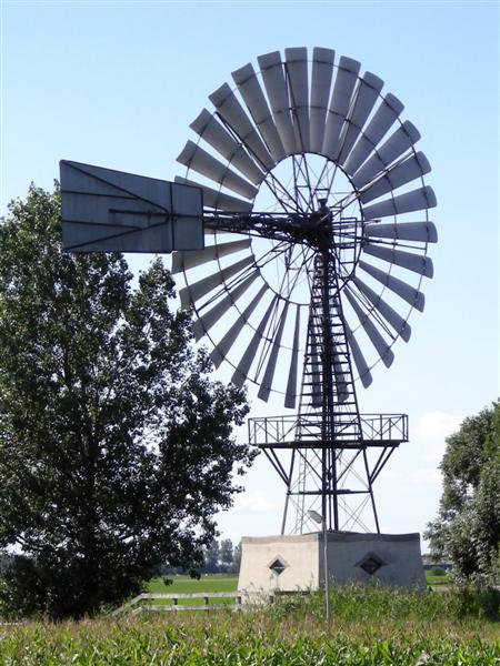 Windmotor bij Koudum